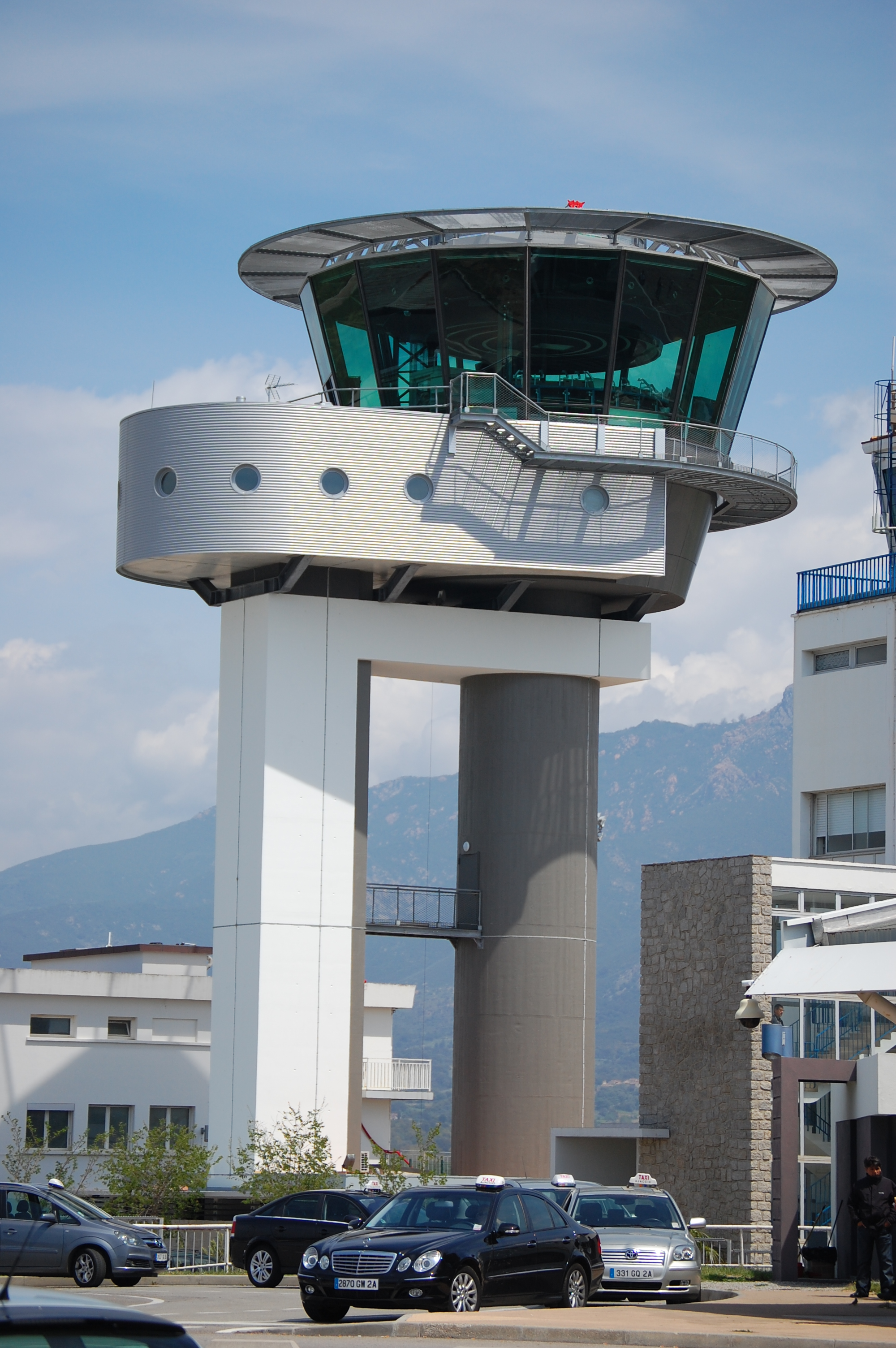 La tour de contrôle de l'aéroport d'Ajaccio Napoléon Bonaparte / The tower of the airport of Ajaccio (LFKJ)